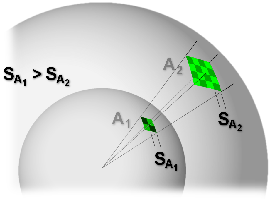 Das Bild beschreibt die Leistungsdichte S einer elektromagnetischen Strahlung. Wird von einem isotropen Kugelstrahler hochfrequente Energie abgestrahlt, so verteilt sich diese gleichmäßig nach allen Richtungen. Demzufolge bilden Flächen gleicher Leistungsdichte Kugeln um den Strahler. Bei größer werdendem Kugelradius verteilt sich die Energie auf eine größere Fläche (A=4·π·R²) um den Strahler. Oder anders ausgedrückt: bezogen auf eine angenommene Fläche wird die Leistungsdichte an der Fläche mit steigendem Abstand geringer.